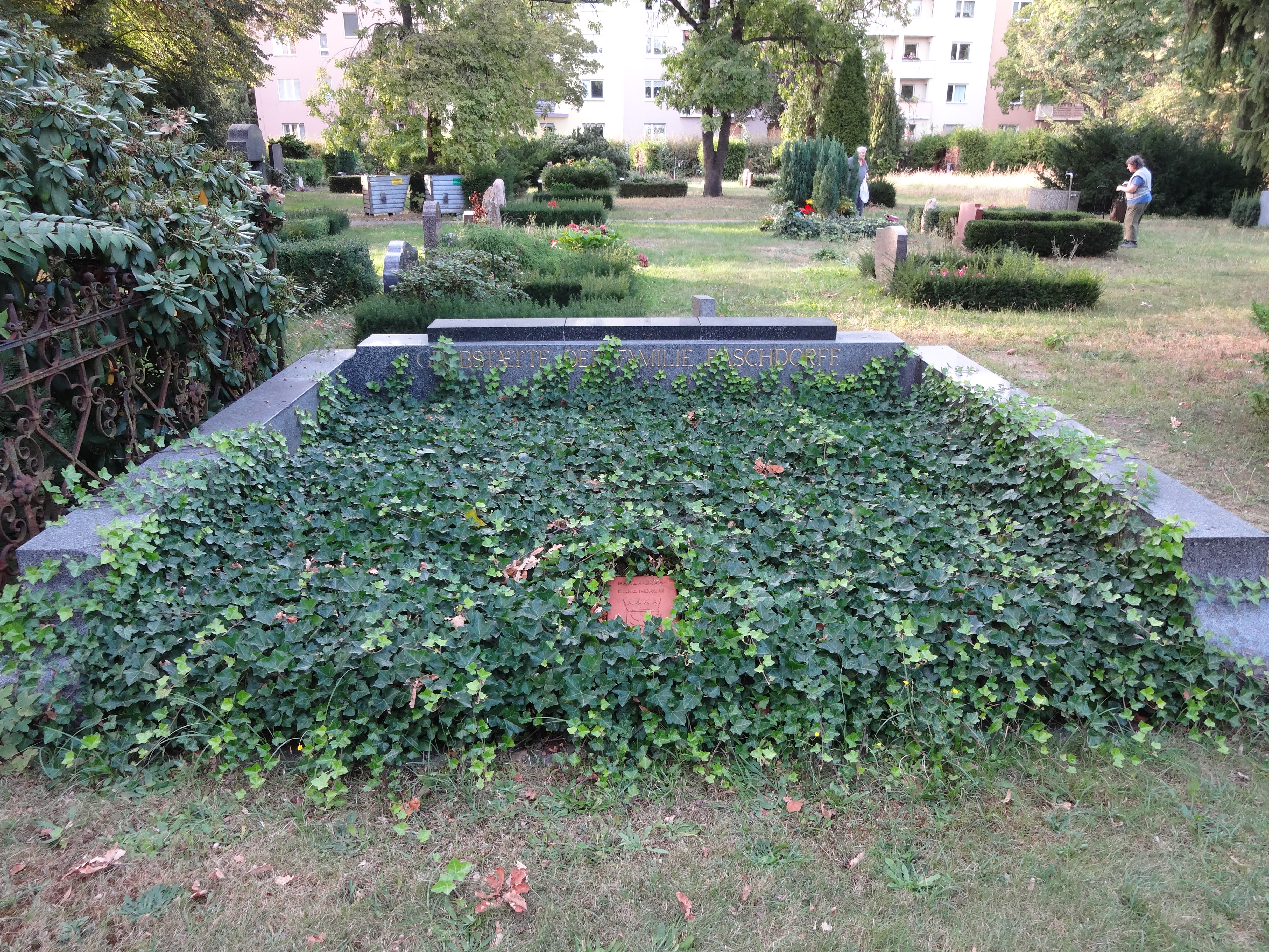 Grab von Julius Carl Raschdorf auf dem Dorotheenstädtischen Friedhof II in der Liesenstraße in Berlin-Gesundbrunnen; Ehrengrab